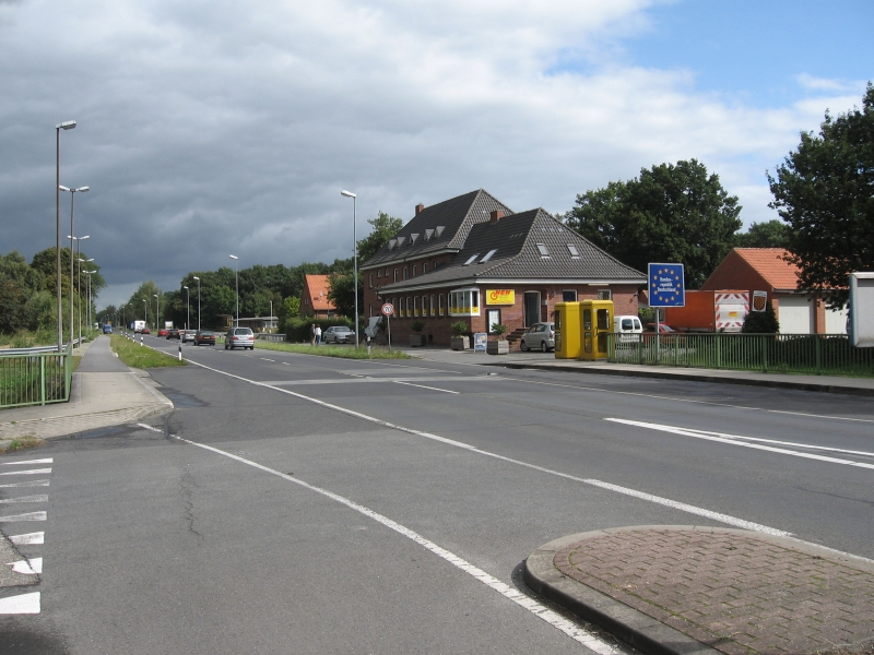 Grensovergang Denekamp (NL) / Nordhorn (D) - Grenzübergang Nordhorn (D) / Denekamp (NL)